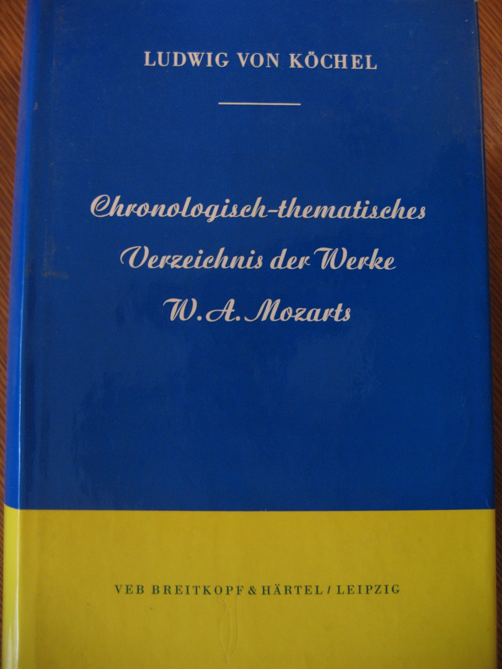 Catalogue Köchel des œuvres de Mozart.